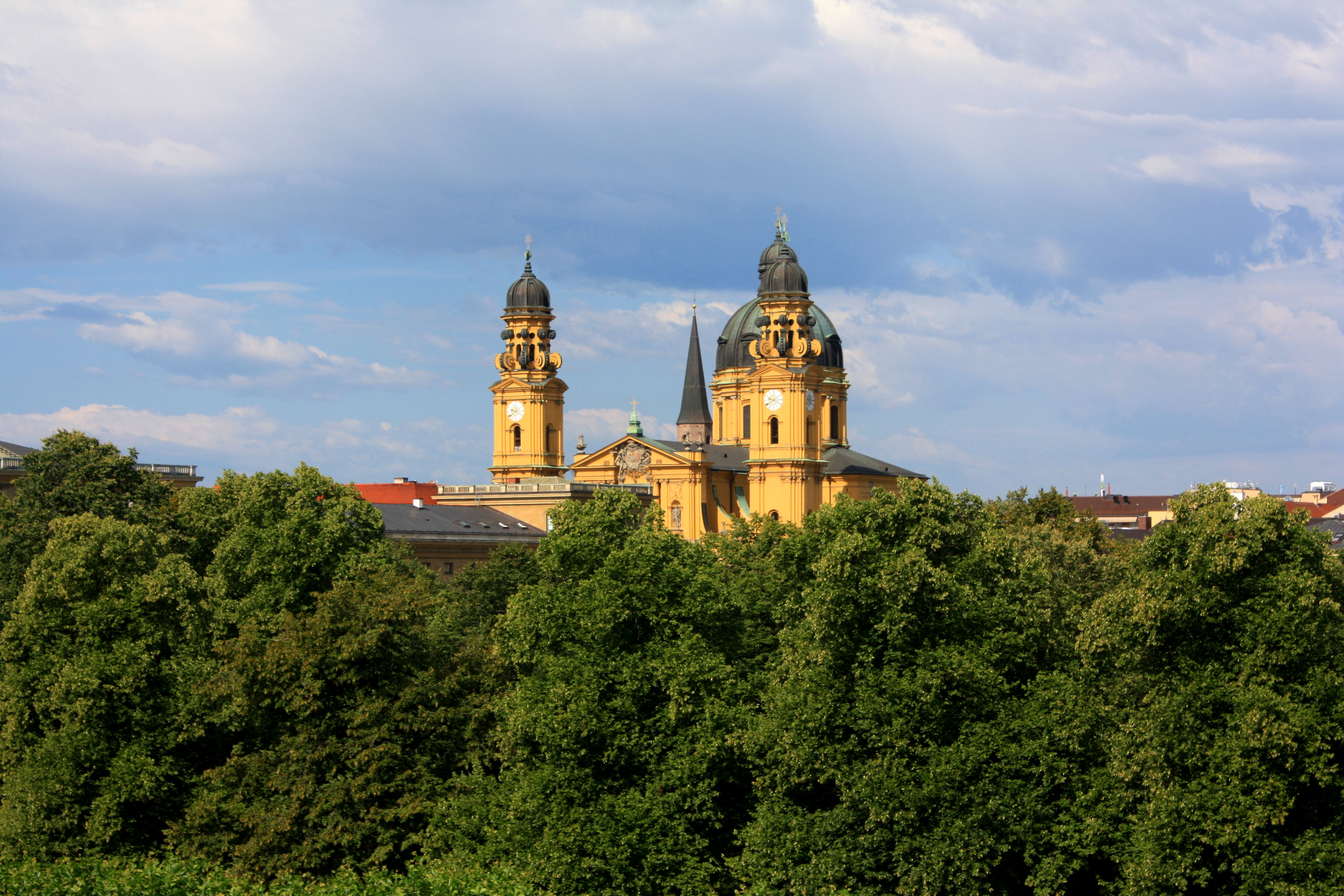 Theatinerkirche